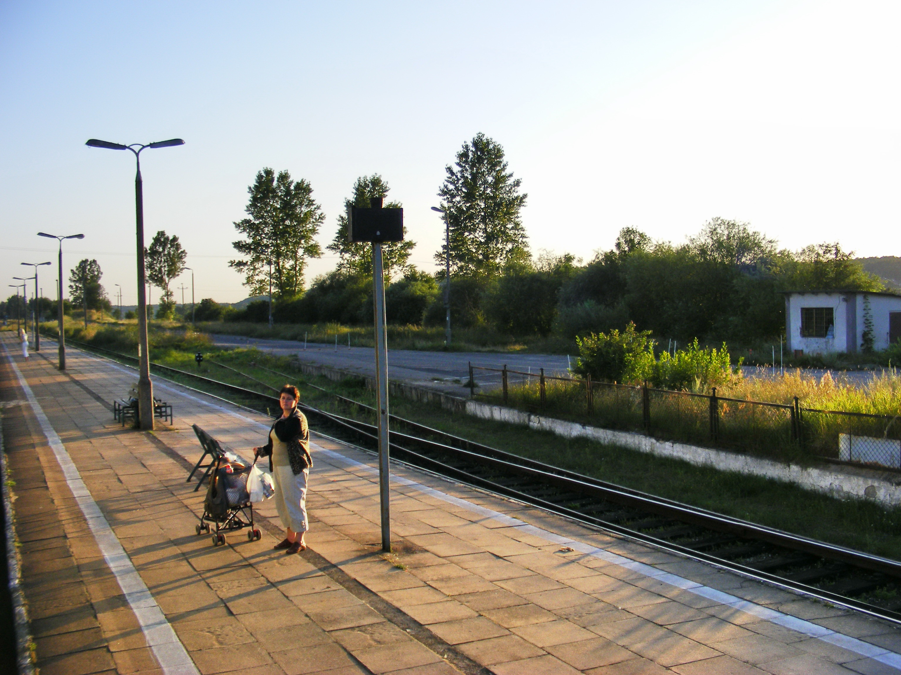 Stacja kolejowa Gołubie Kaszubskie (woj. pomorskie)